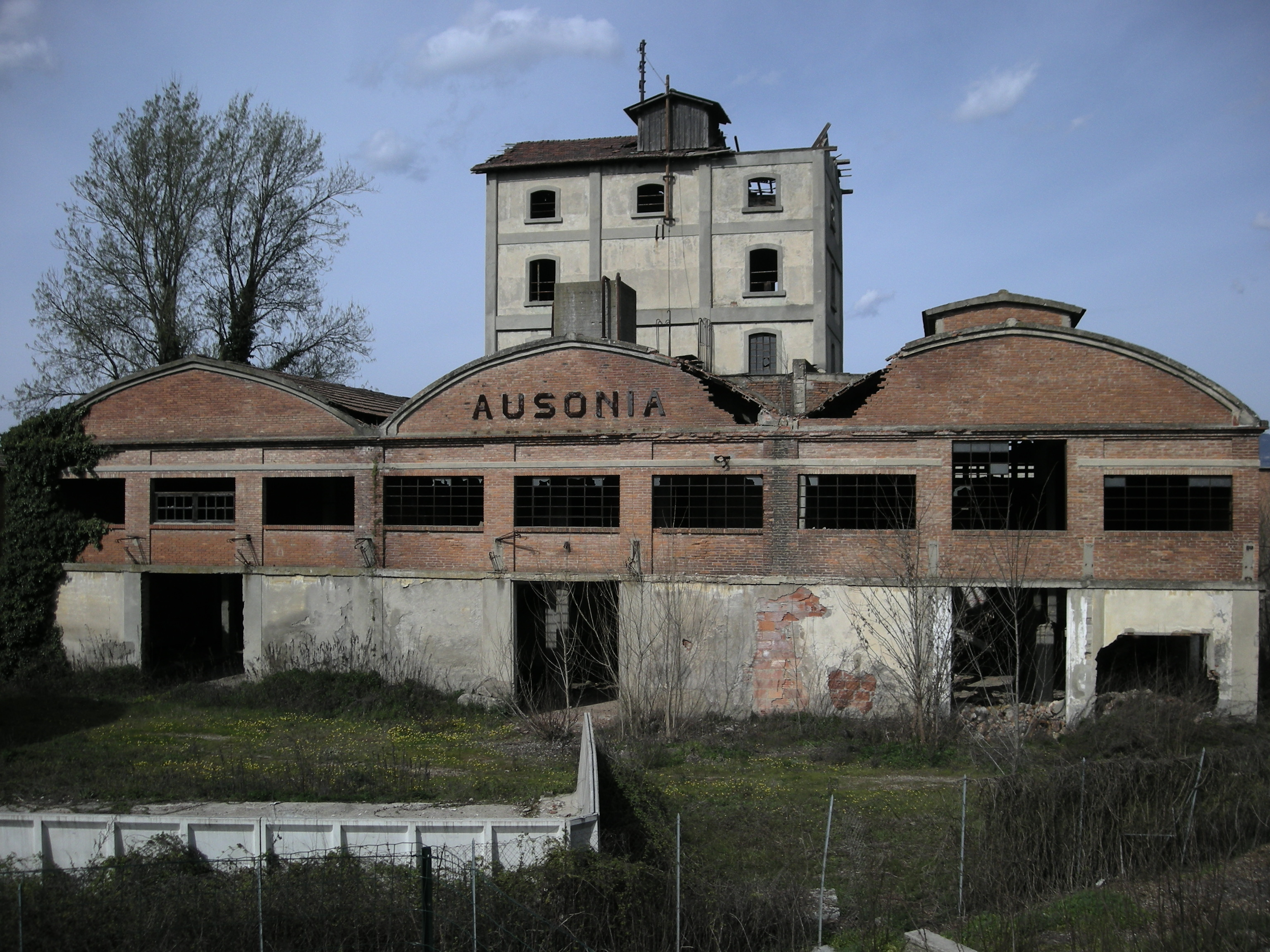 Il vecchio impianto Ausonia della Montecatini a San Donnino (Campi Bisenzio - FI)